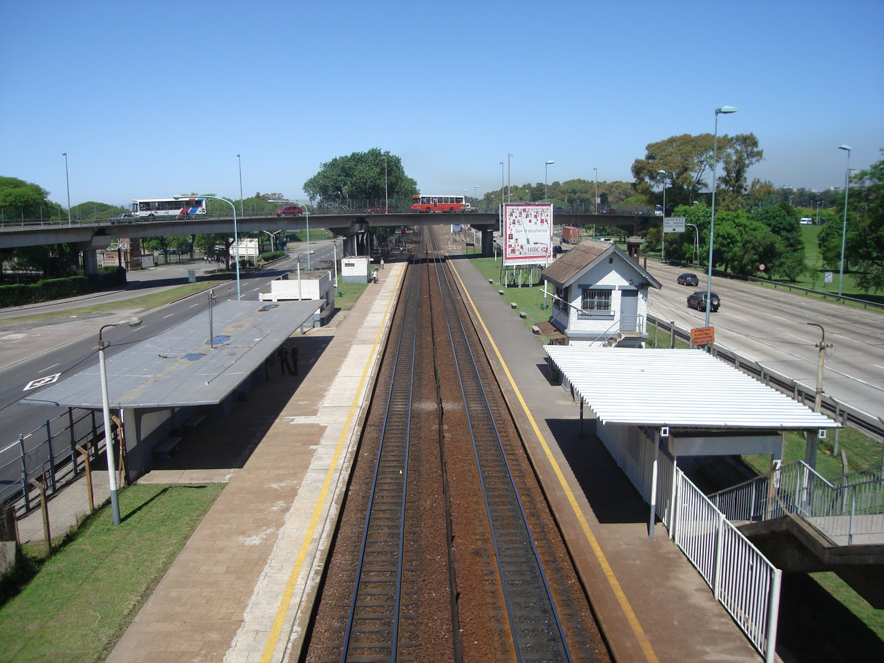 Vista aérea de la estación Raúl Scalabrini Ortiz del Ferrocarril General Belgrano desde el puente peatonal. Buenos Aires, República Argentina.